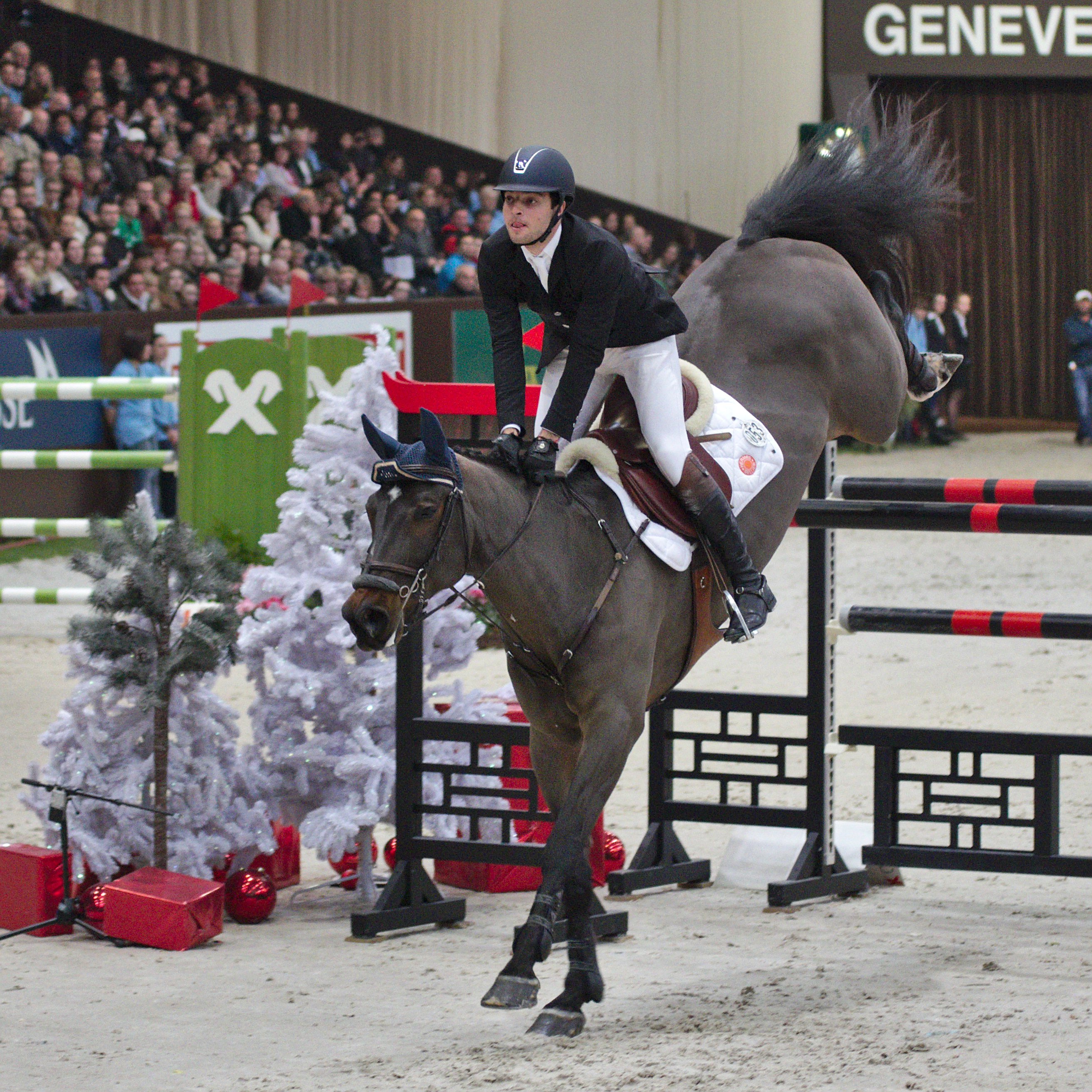 CHI Genève 2013 - 20131215 - Daniel Bluman et Sancha LS